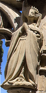 Blanka Navarrská